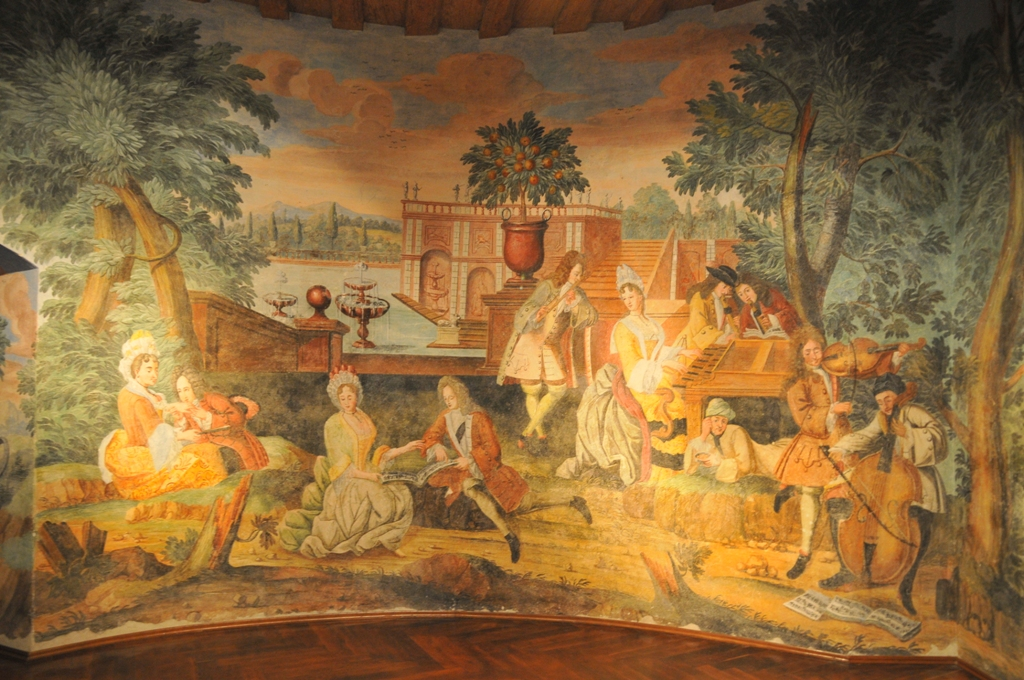 Stolp s freskami Štirje letni časi